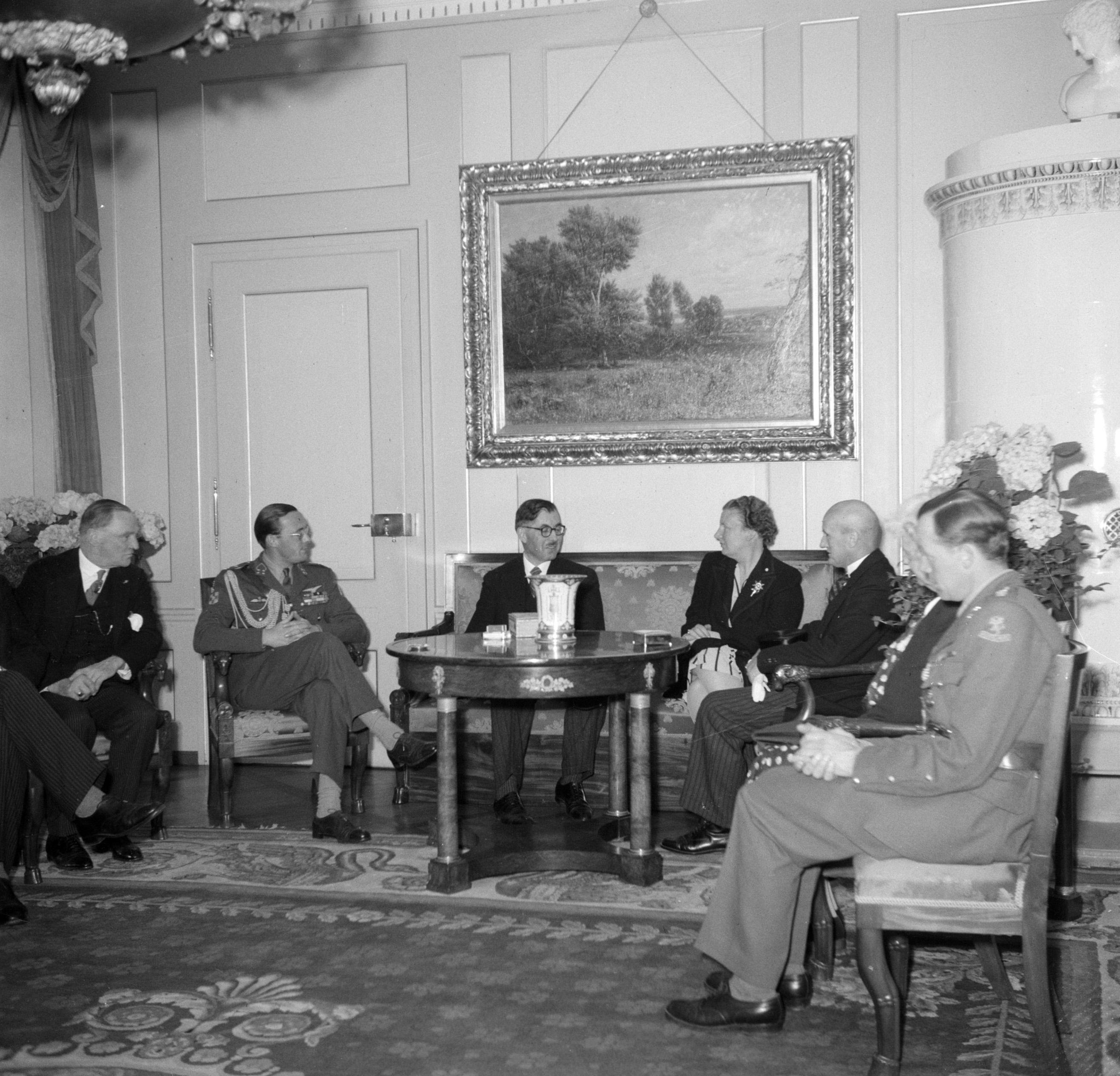 Collectie / Archief : Fotocollectie Van de Poll Reportage / Serie : Officieel bezoek van prinses Juliana en prins Bernhard aan Zwitserland Beschrijving : Prinses Juliana en prins Bernhard in gesprek met de Zwitserse Bondspresident en andere autoriteiten in de Villa Lohn in Kehrsatz Datum : 20 mei 1946 Locatie : Zwitserland Trefwoorden : bezoeken, prinsen, prinsessen, schilderijen, uniformen, woninginterieurs Persoonsnaam : Bernhard (prins Nederland), Etter, Ph., Juliana (prinses Nederland), Kobelt, K. Fotograaf : Poll, Willem van de Auteursrechthebbende : Nationaal Archief Materiaalsoort : Negatief (zwart/wit) Nummer archiefinventaris : bekijk toegang 2.24.14.02 Bestanddeelnummer : 252-1985